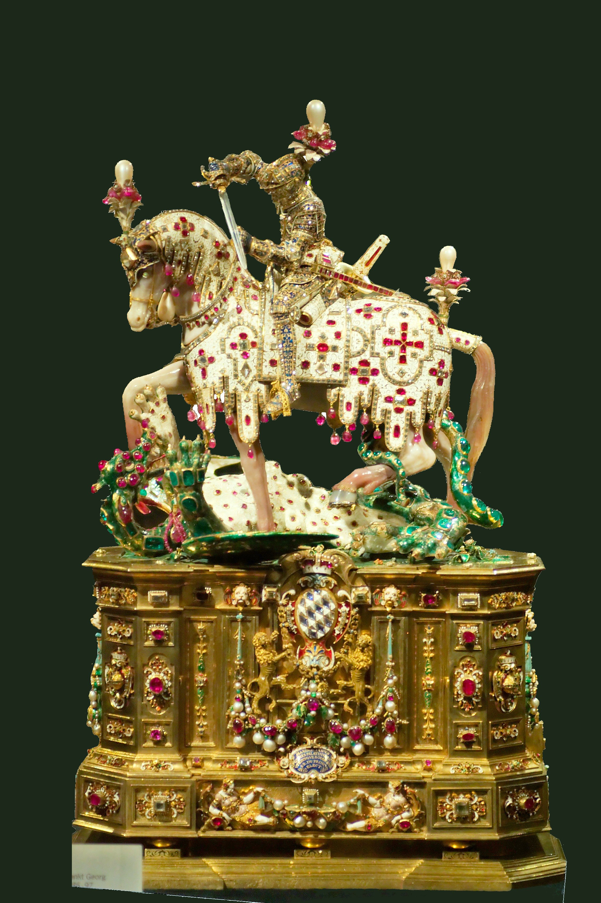 Statue des Heiligen Georg, Schatzkammer München, zwischen 1586 und 1597